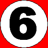 波士顿红袜退役球衣示意图。